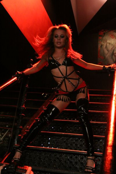 Светлана Иванова на съёмках клипа Девочки-лунатики